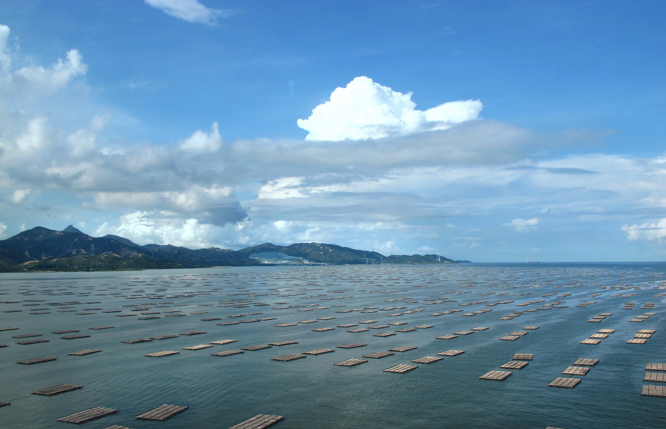 Deep Bay